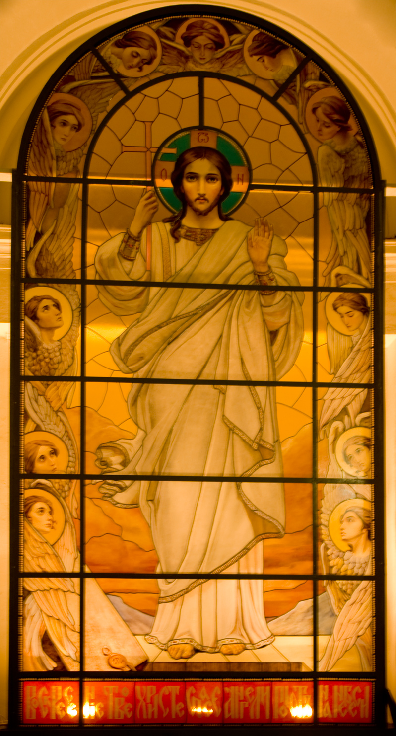 Витраж в Петропавловском соборе.